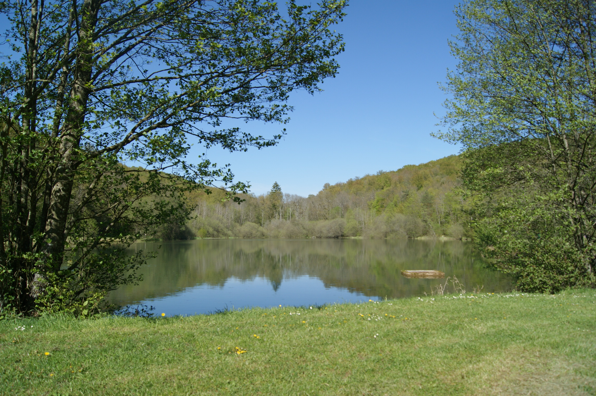 L'ÉTANG DE VERNOIS-LES-VESVRES